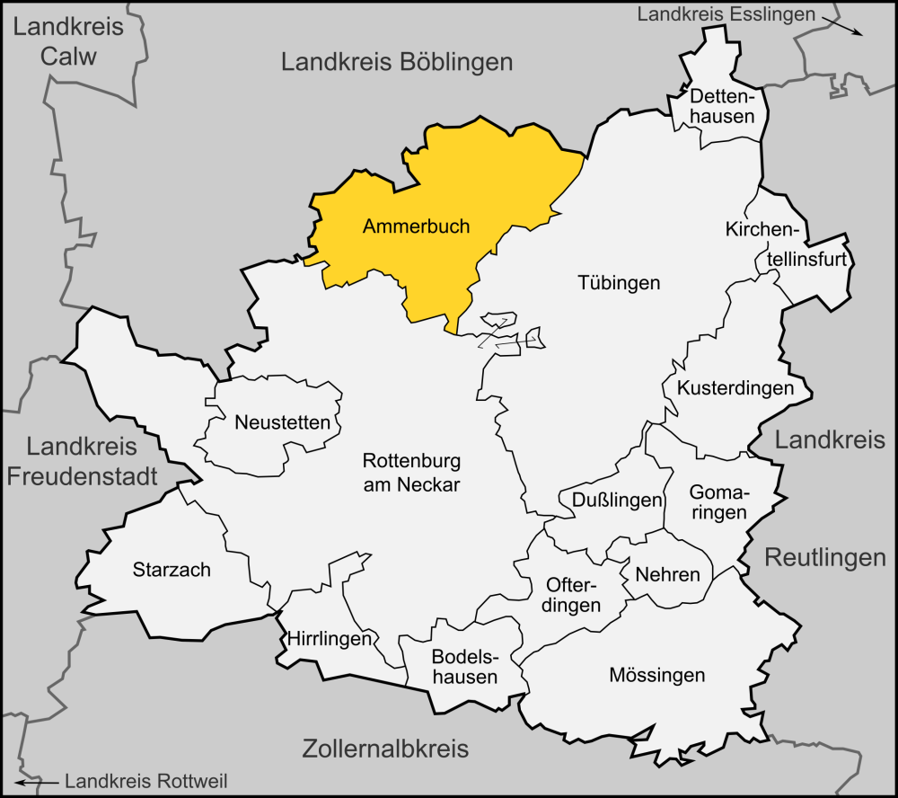 Karte der Gemeinde Ammerbuch im Landkreis Tübingen